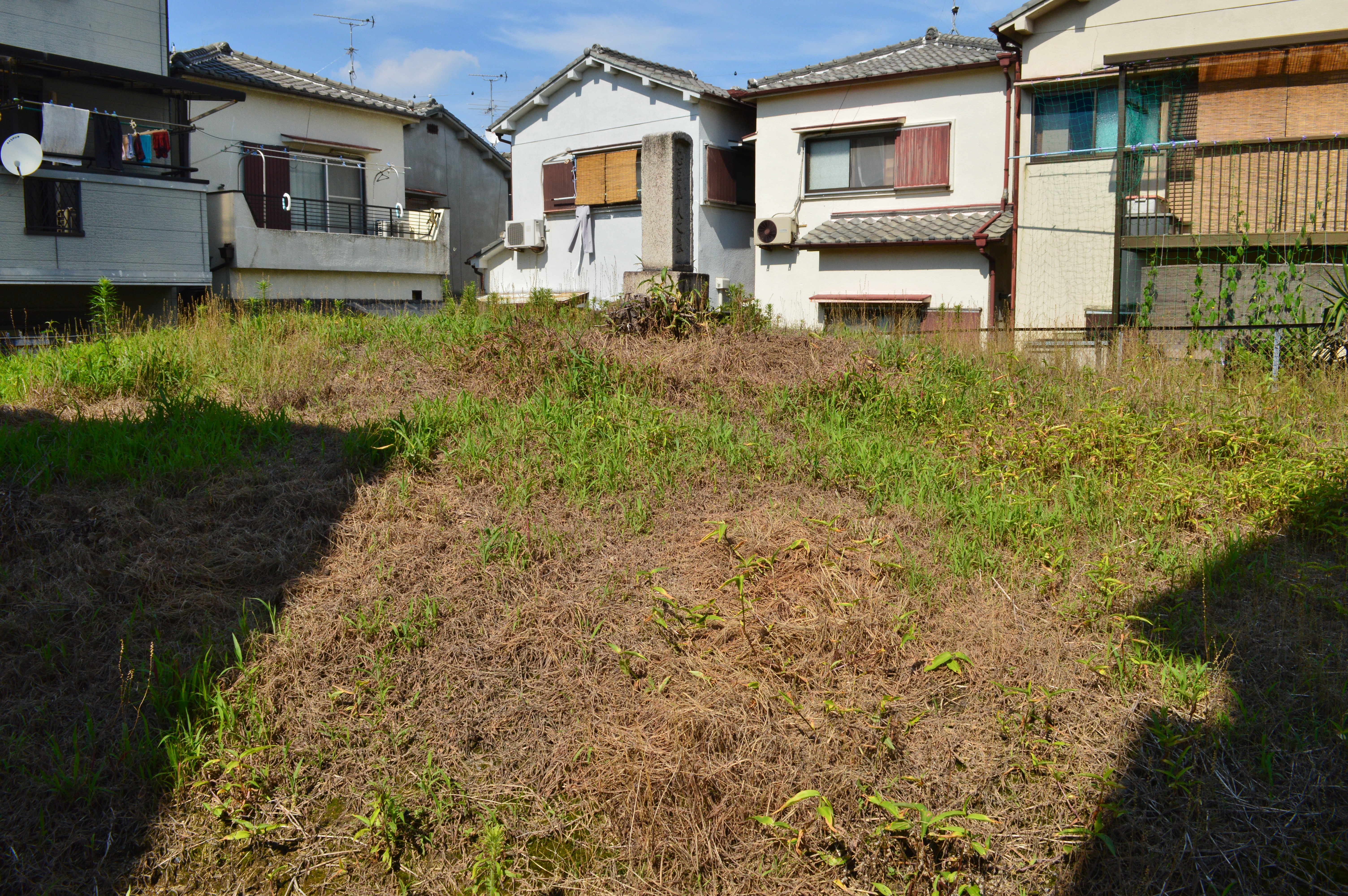 雄略天皇丹比高鷲原陵 飛地い号